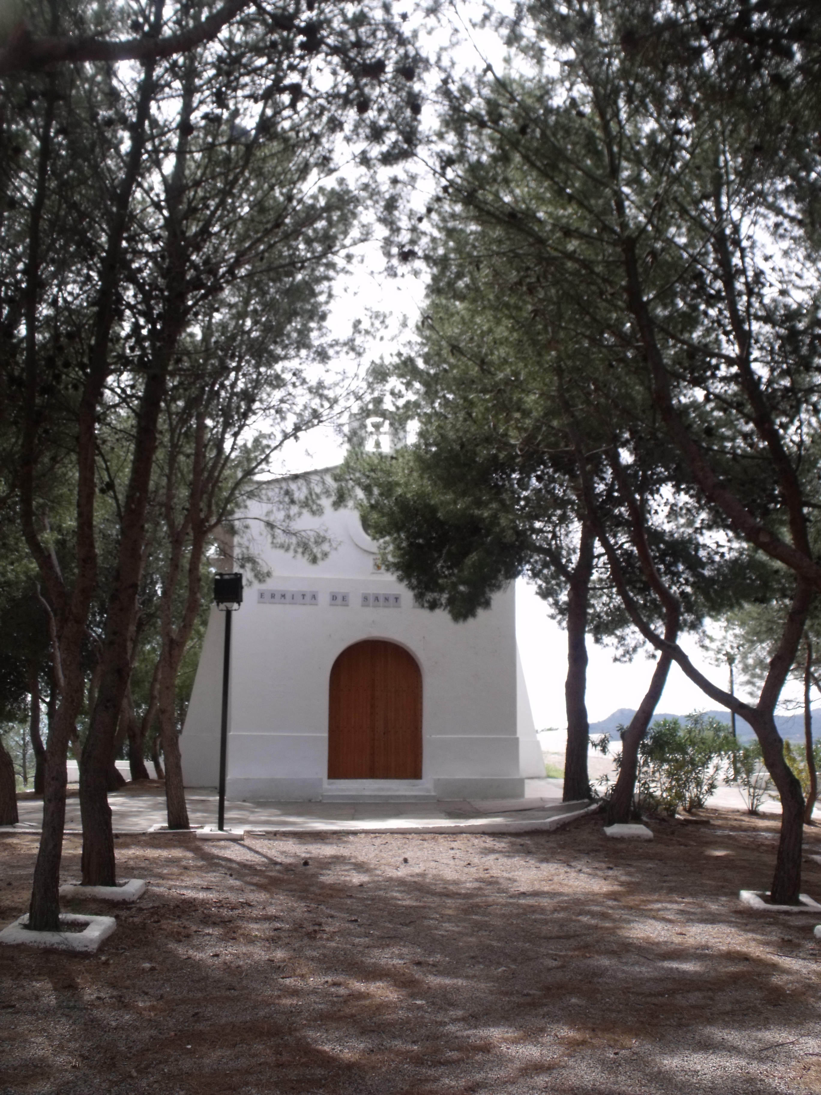 Vista general de la Ermita